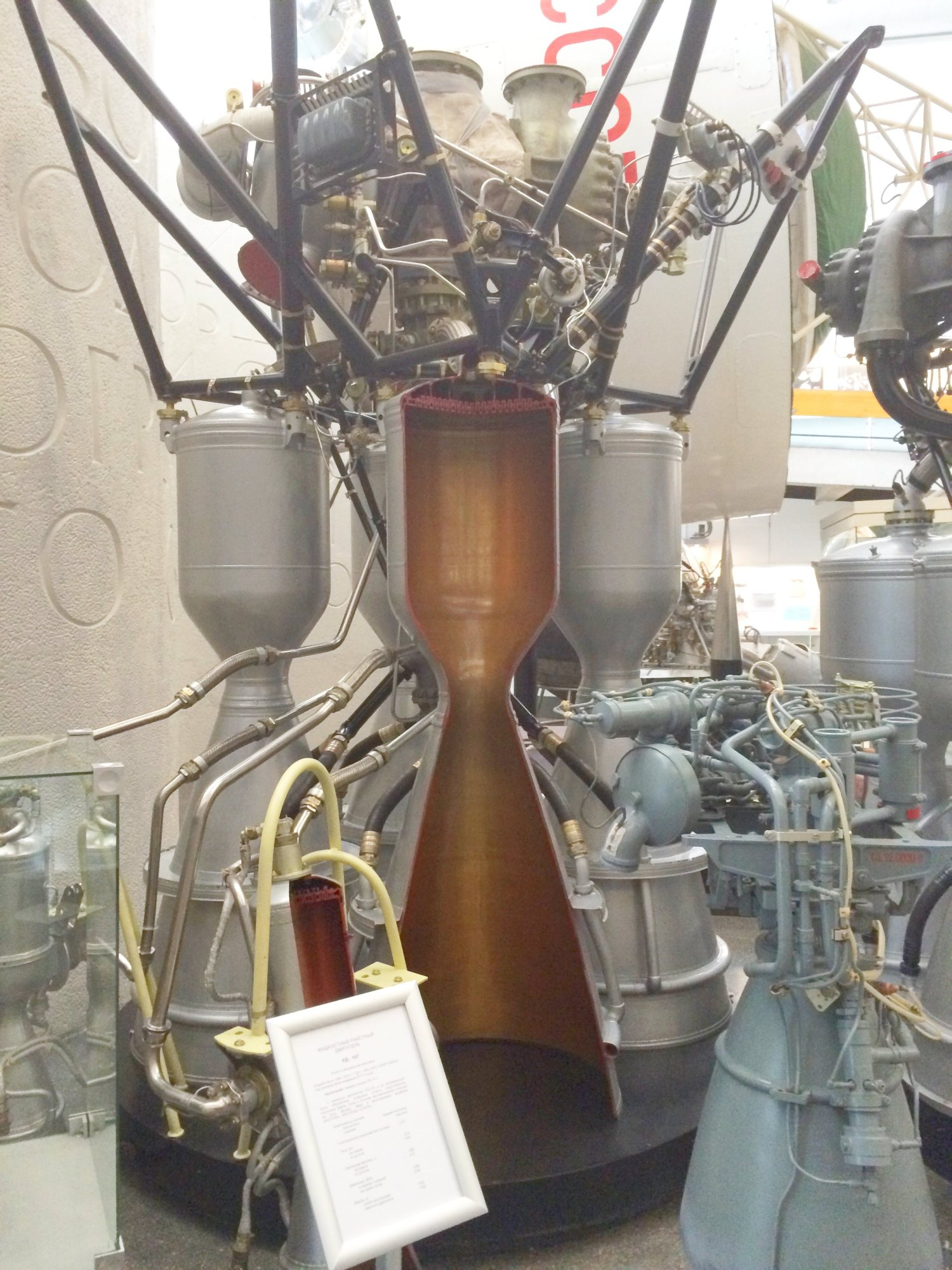 Поперечное сечение реактивного двигателя РД-107 (Государственный музей истории космонавтики имени К. Э. Циолковского)